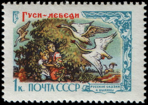 "Гуси-лебеди". Художник: Е. Комаров. Марки СССР, номинал - 1коп.